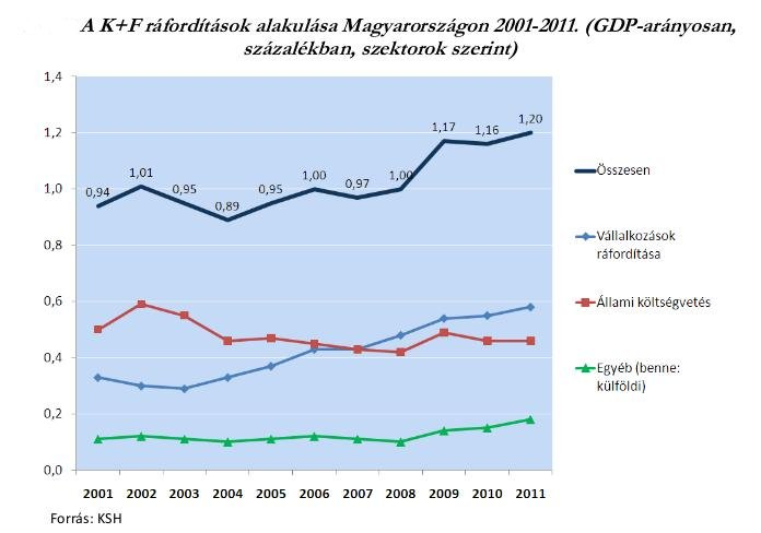 A diagrammon az látható, hogy a kutatás-fejlesztés finanszírozása milyen arányban történt külföldi, hazai állami és vállalkozások által összeadott forrásokból. Jól látható, hogy az állami forrás részaránya a vállalatihoz képest folyamatosan csökken.